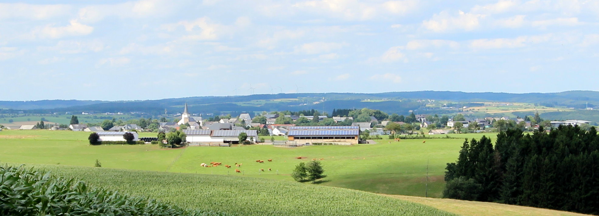 54597 Auw bei Prüm. Aufnahme von 2017.